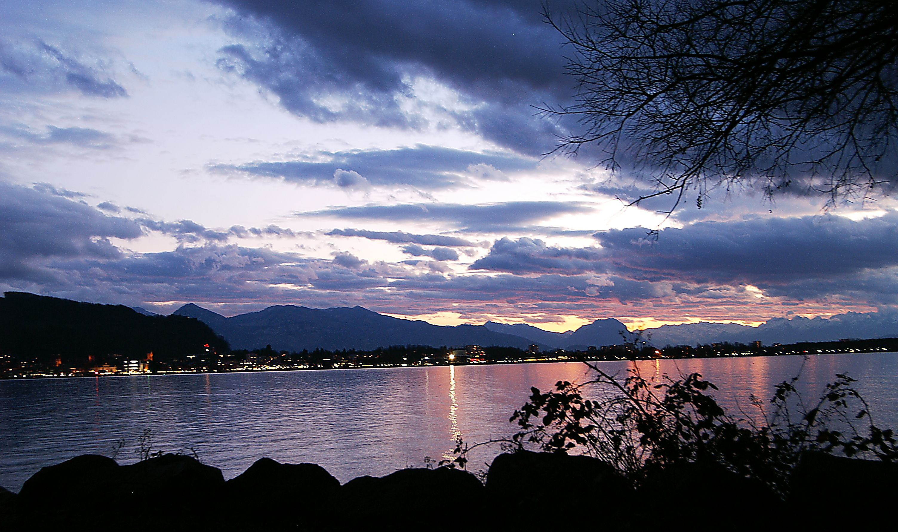 Strandbad Lochau mit Sicht auf Bregenz am Bodensee. Veröffentlicht: Georg Kessler in "Freizeit im Ländle, Die schönsten Ausflugziele in Vorarlberg ISBN 978-3-7022-3068-5 2010